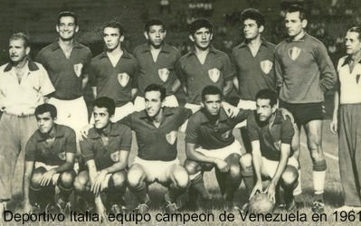 Foto tomada personalmente por el director Mino D'Ambrosio de su equipo Deportivo Italia en 1961. El era mi tio y me la ha dedicado entonces, cuando el D. Italia fue Campeon de Venezuela. Sobre esta foto he hecho u na foto digital, que he modificado con mi software poniendo un escrito clarificatorio.